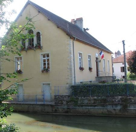 La mairie de Vauconcourt-Nervezain